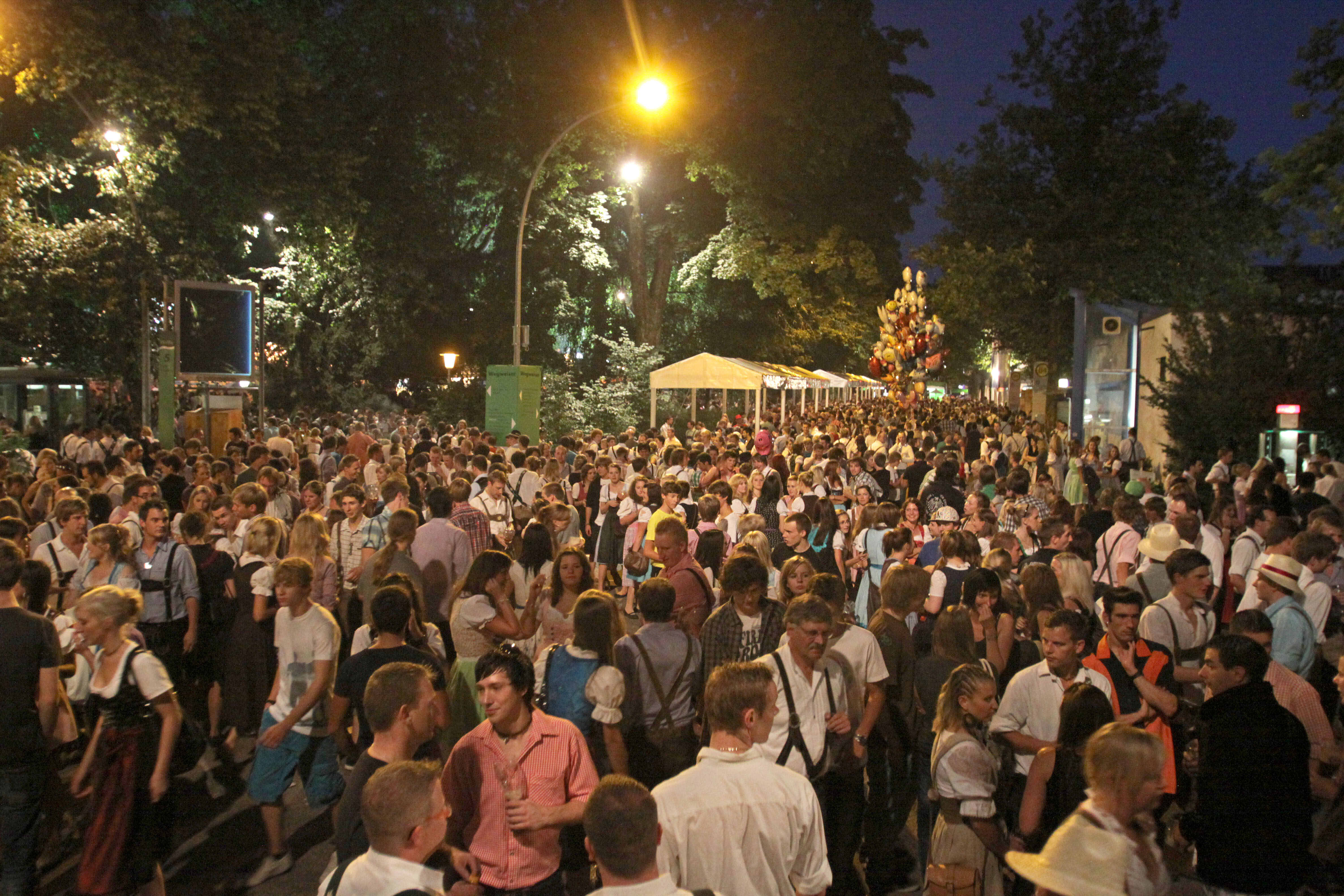 Allgäuer Festwoche Kempten